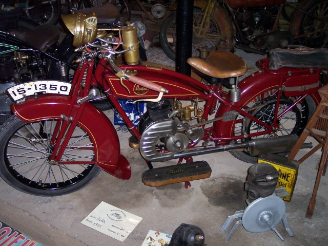 Eine Hulla 200 aus dem Jahre 1925, eigenes Bild, aufgenommen im Motorradmuseum Heiner Beckmann